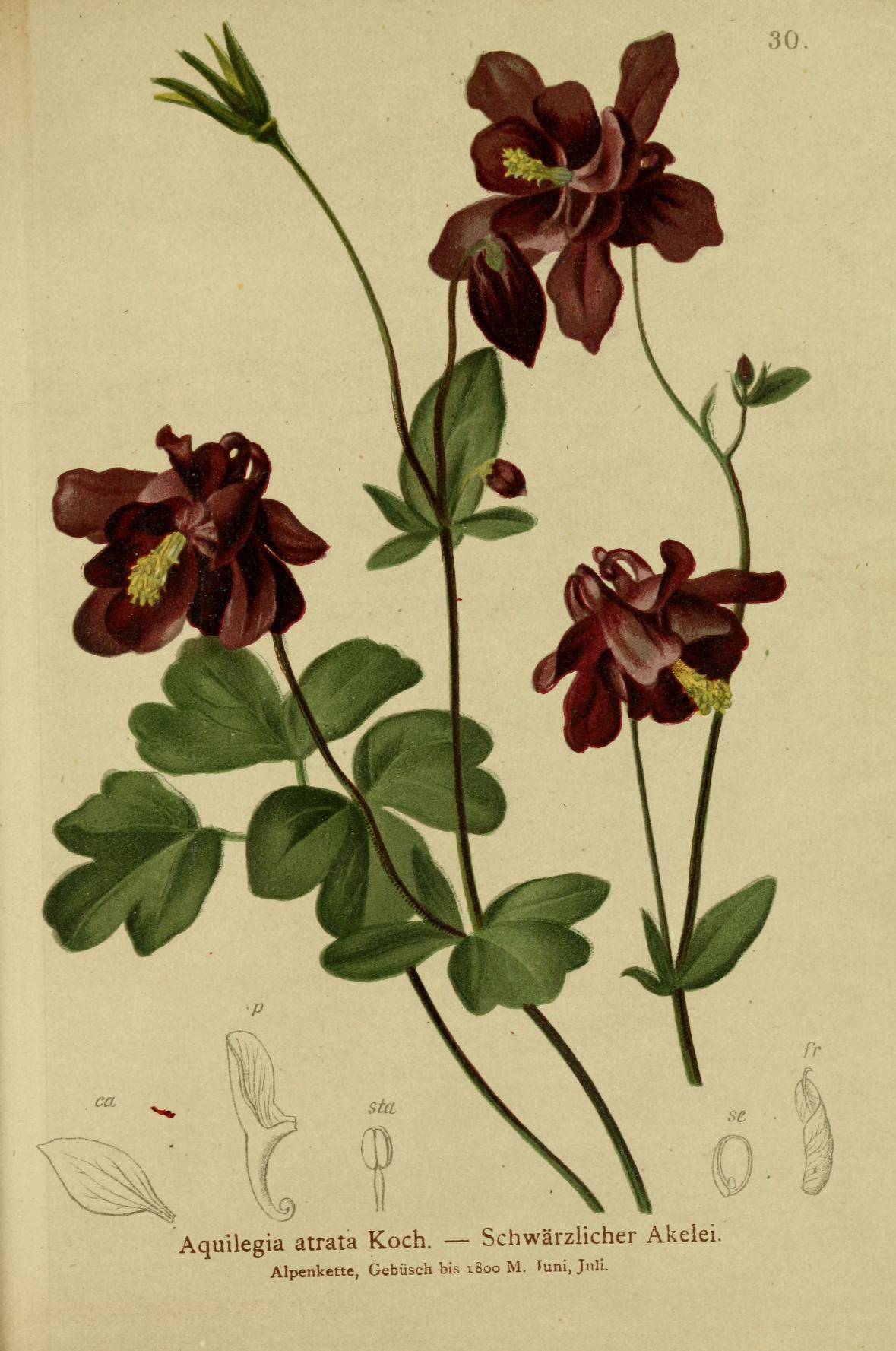 Aquilegia atrata Koch. — Schwärzlicher Akelei. Alpenkette, Gebüsch bis i8oo M. Tuni, Juli.